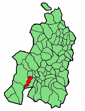 aipaturiko udalerriaren kokapena Nafarroa Beherean